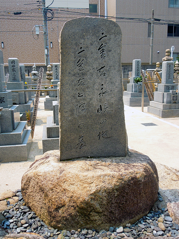 鈴木三重吉13回忌に、鈴木家の菩提寺である長遠寺に建立された墓碑（表面）